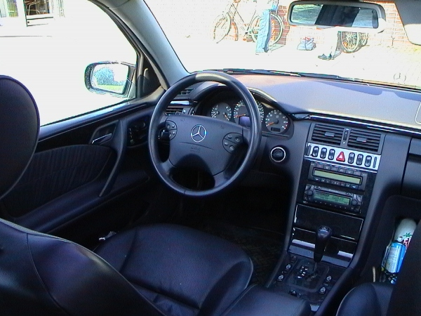 Innenraum E-Klasse